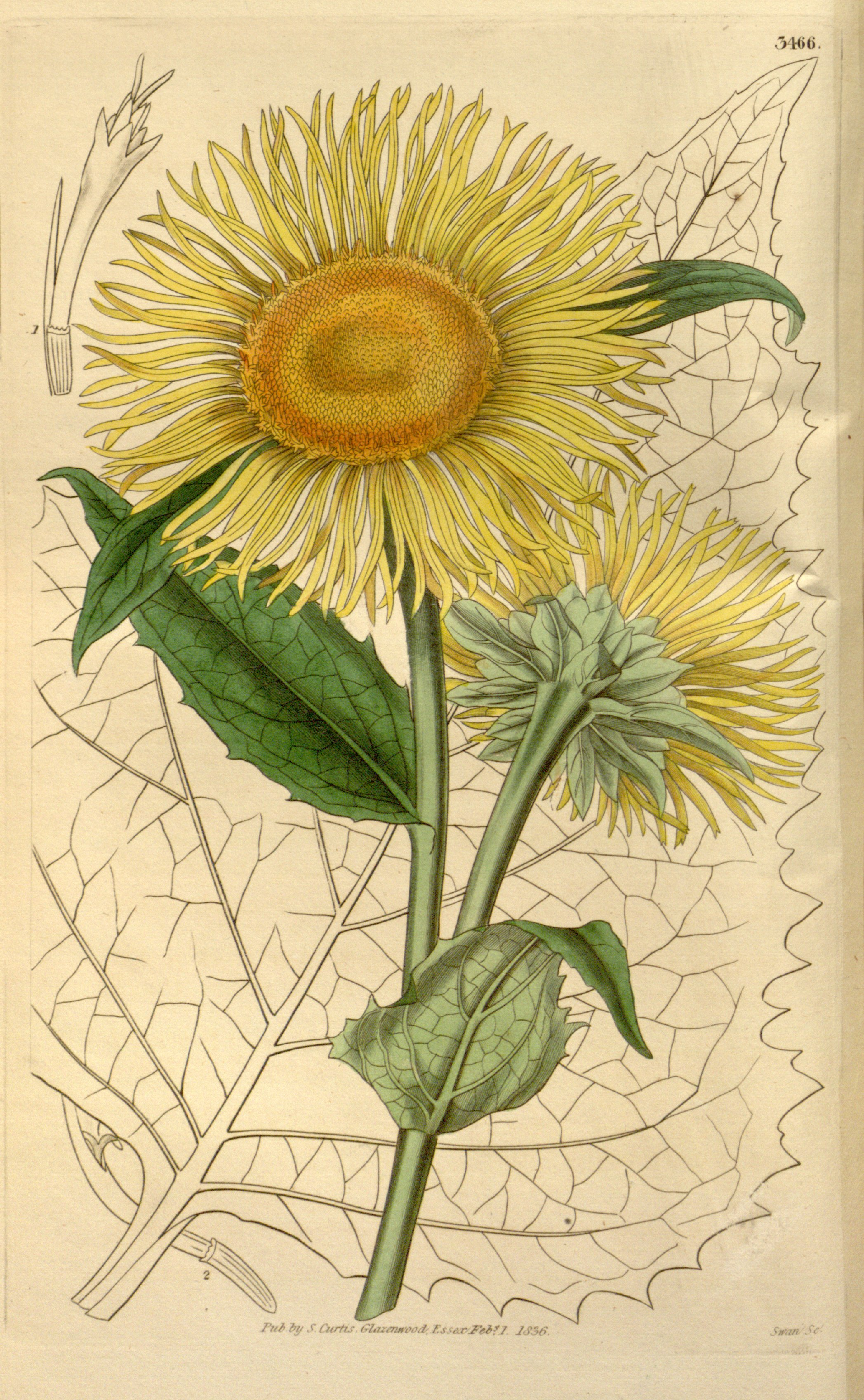 Legende: 1 Röhrenblüte mit Spreublatt. 2 Teil einer Strahlenblüte. (vergr.).